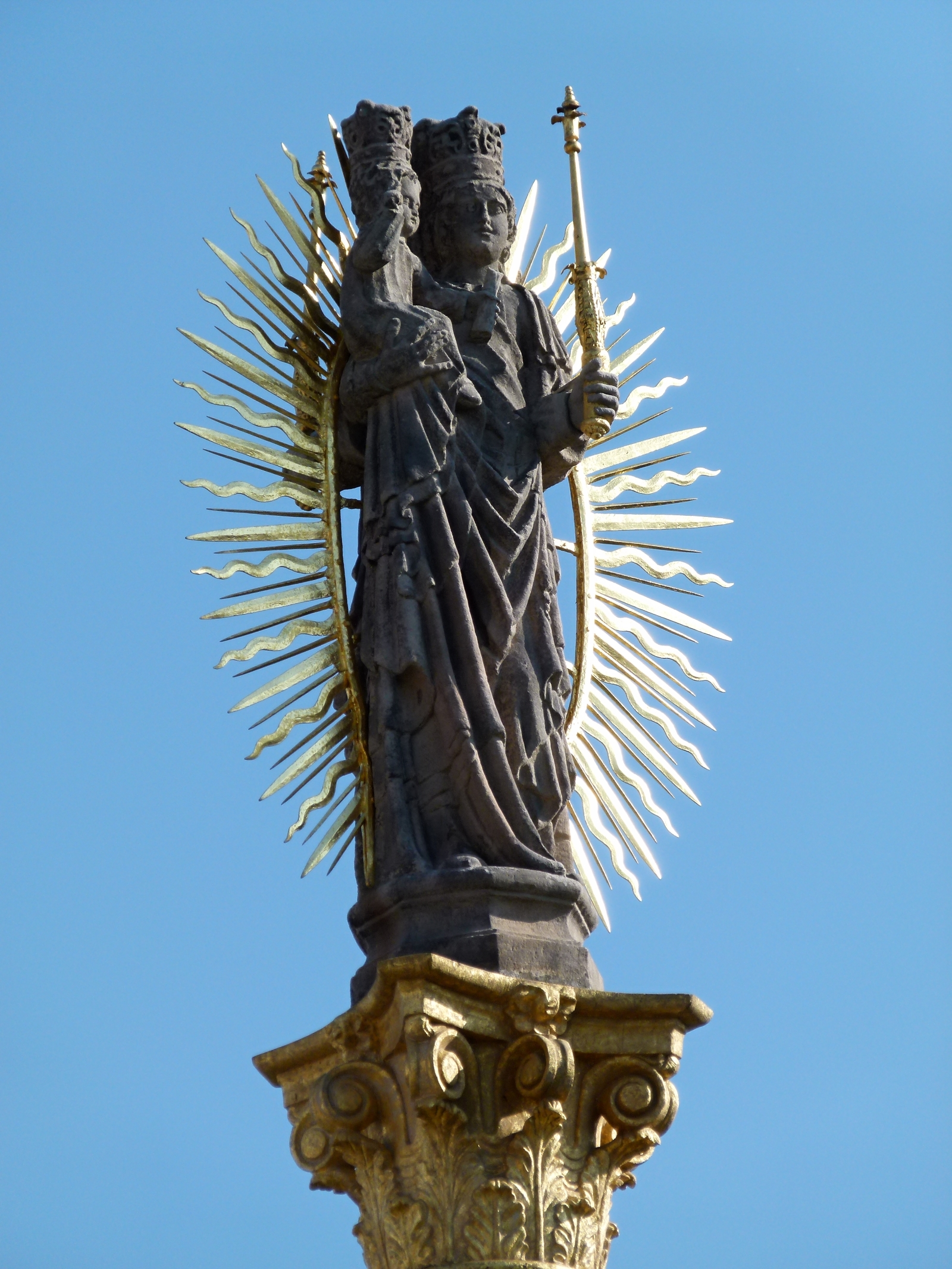 Detail sloupu Panny Marie na Mírovém náměstí v Broumově